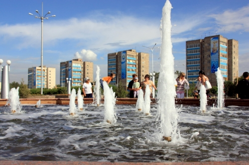 Фонтан на монументе металлургам. Проспект Республики